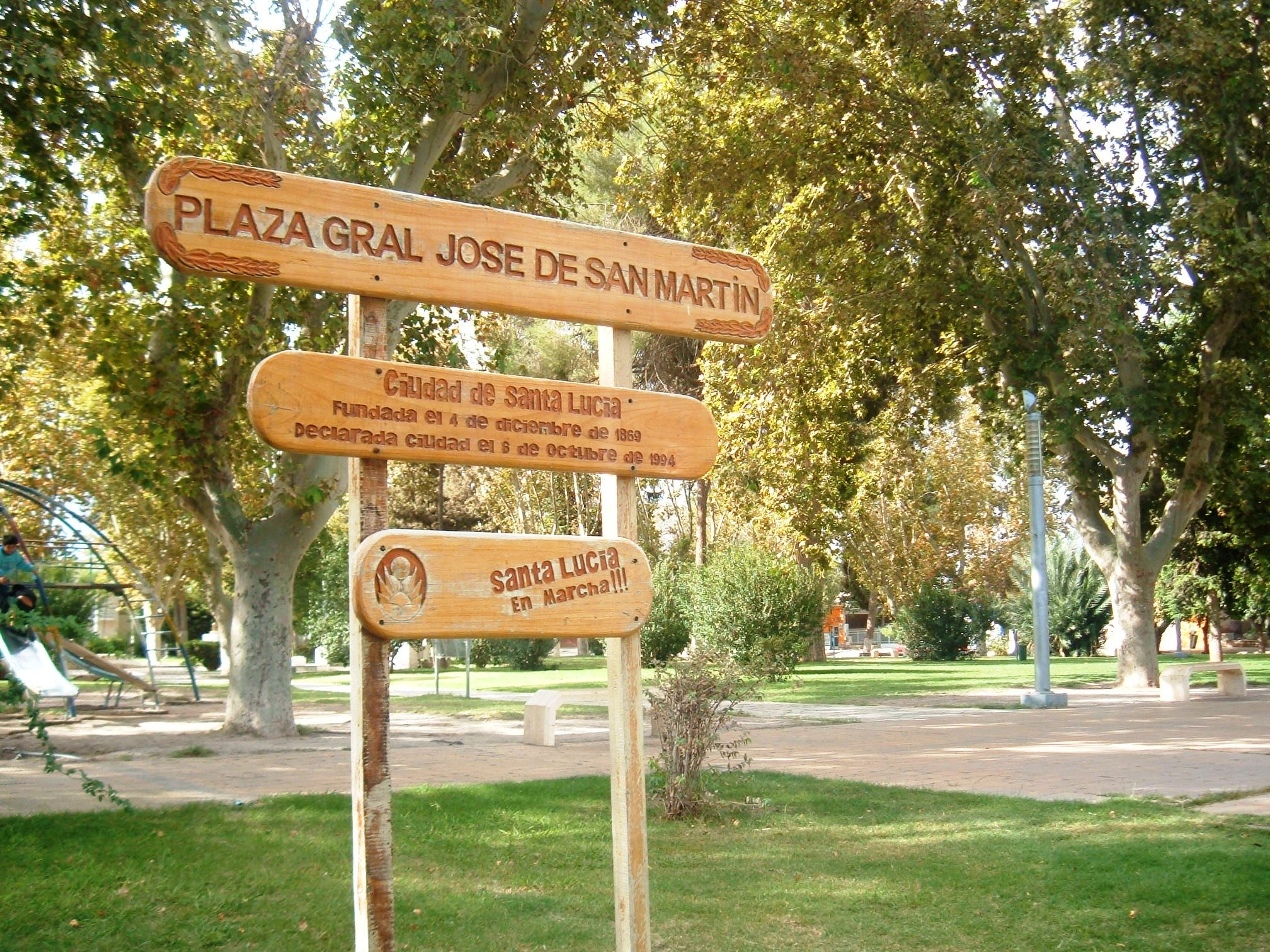 Vista de la plaza principal de la localidad cabecera de Santa Lucía, en el departamento del mismo nombre, provincia de San Juan, Argentina